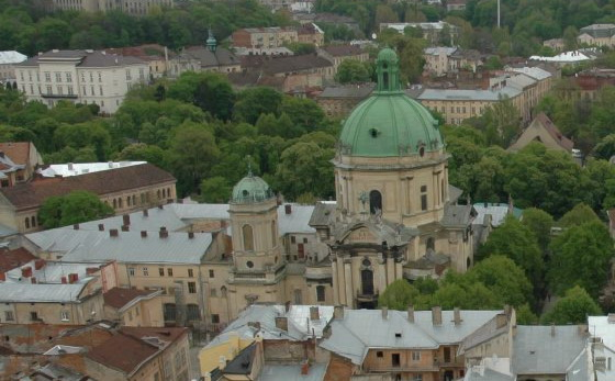 Домініканський собор